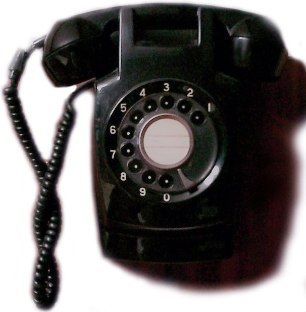 Kuroden(black_telephone)